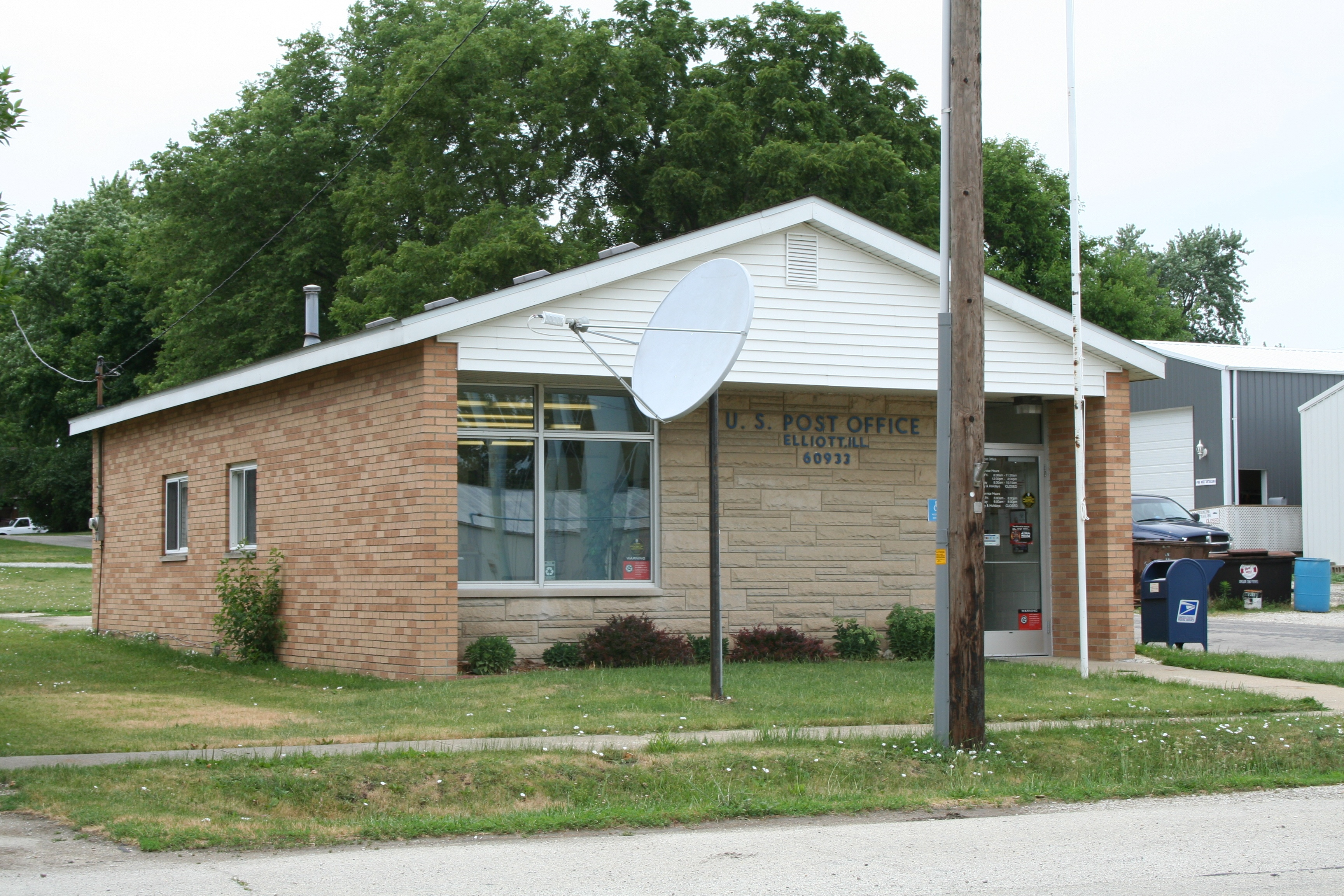 Elliott_Illinois_Post_Office